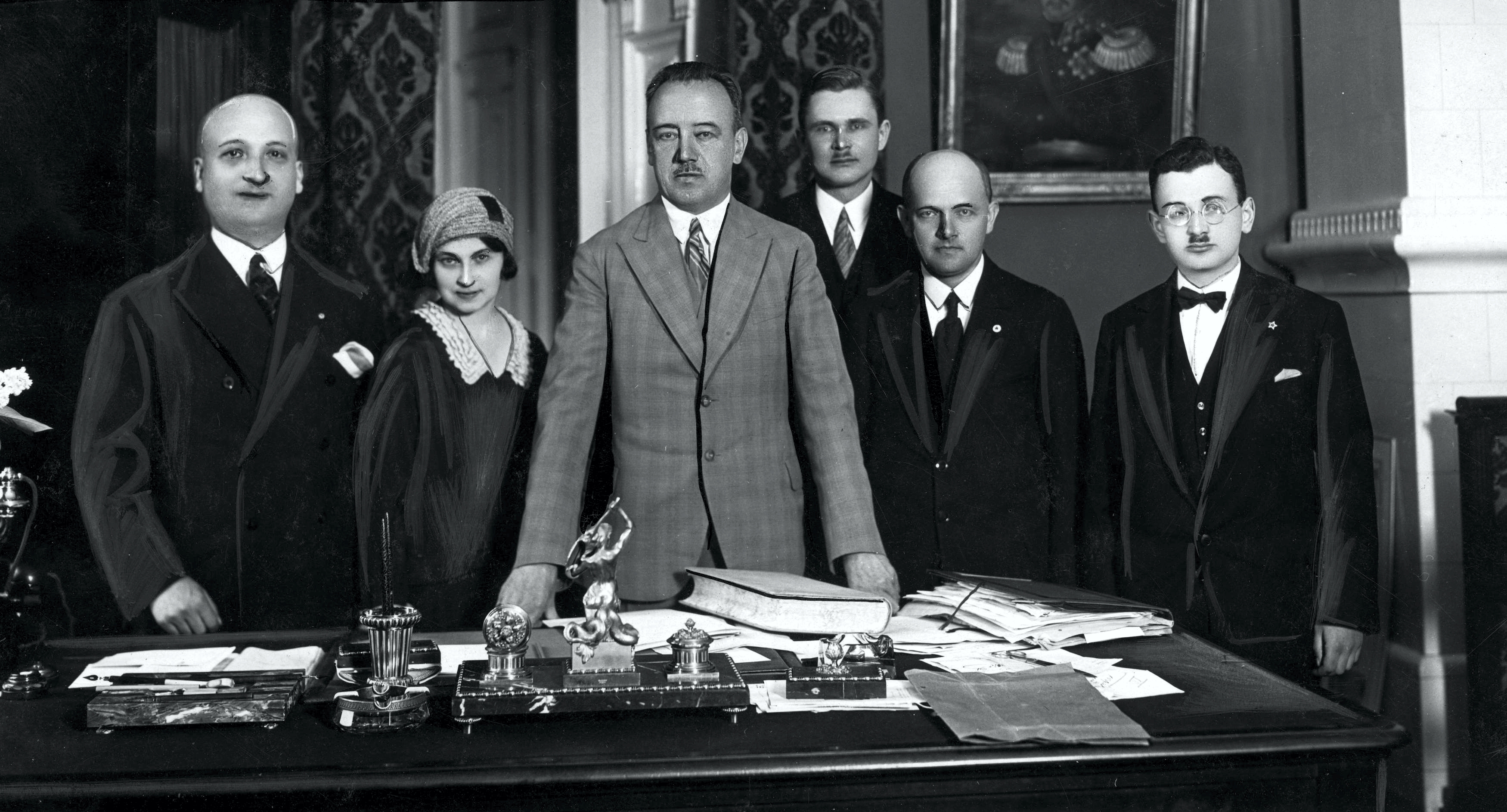 Delegacja esperantystów u prezydenta Warszawy Zygmunta Słomińskiego z petycją o przemianowanie ulicy Dzikiej na Zamenhofa. Widoczni od lewej: Weisenfeld, Weinsteinówna, prezydent Warszawy Zygmunt Słomiński, inżynier I.Pomorski, A.Czubryński, Dratwer.